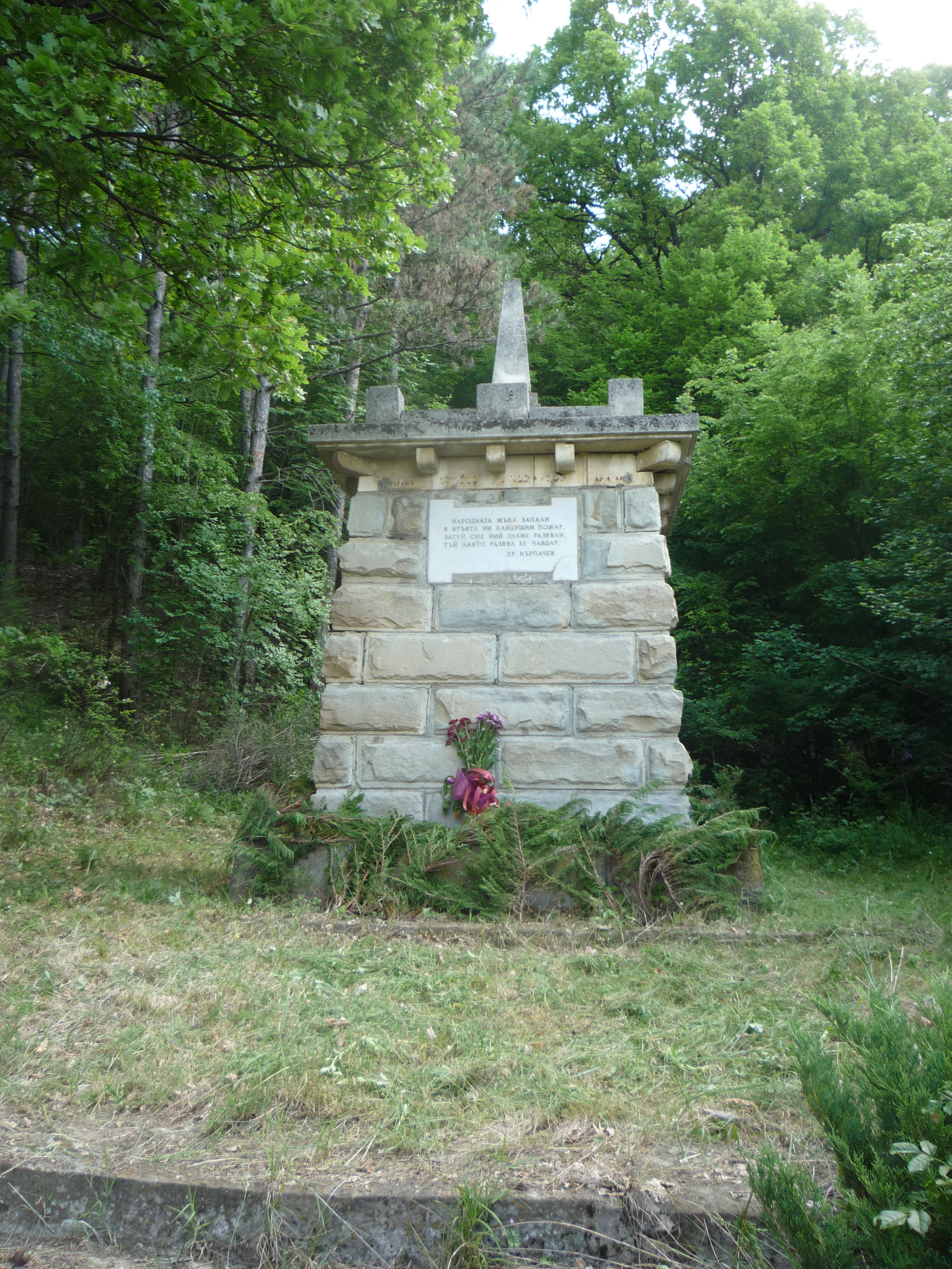 Паметник на Христо Кърпачев, местността "Сливешки ливади". Ловеч.